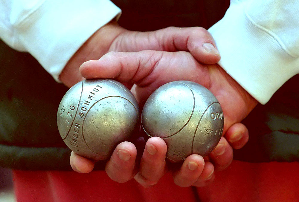 Boulespieler fotografiert von Claudius Tesch